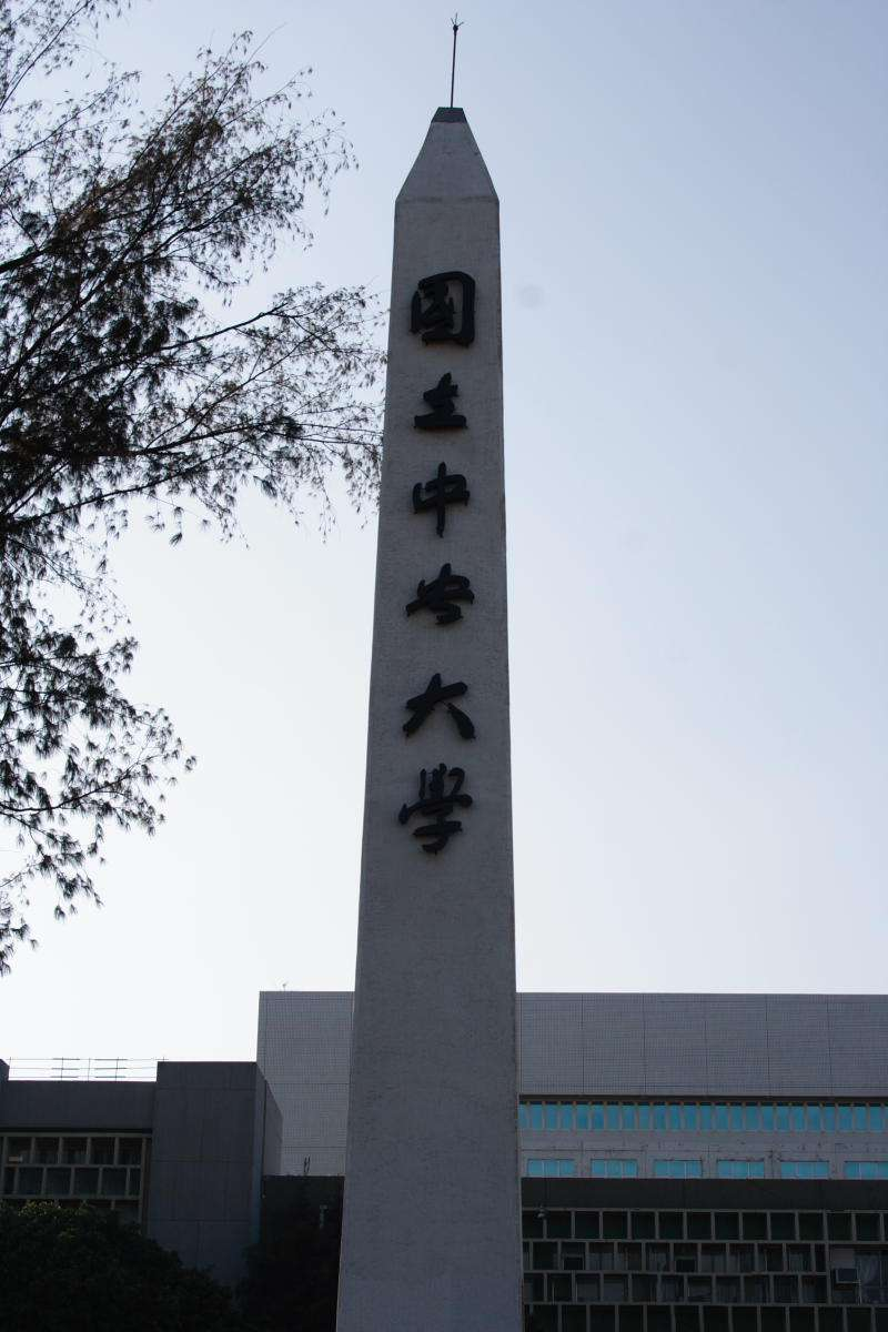 國立中央大學。